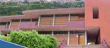 Preparatoria del sur de Guanajuato